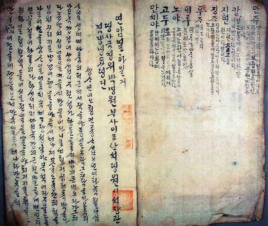 朴趾源作、熱河日記